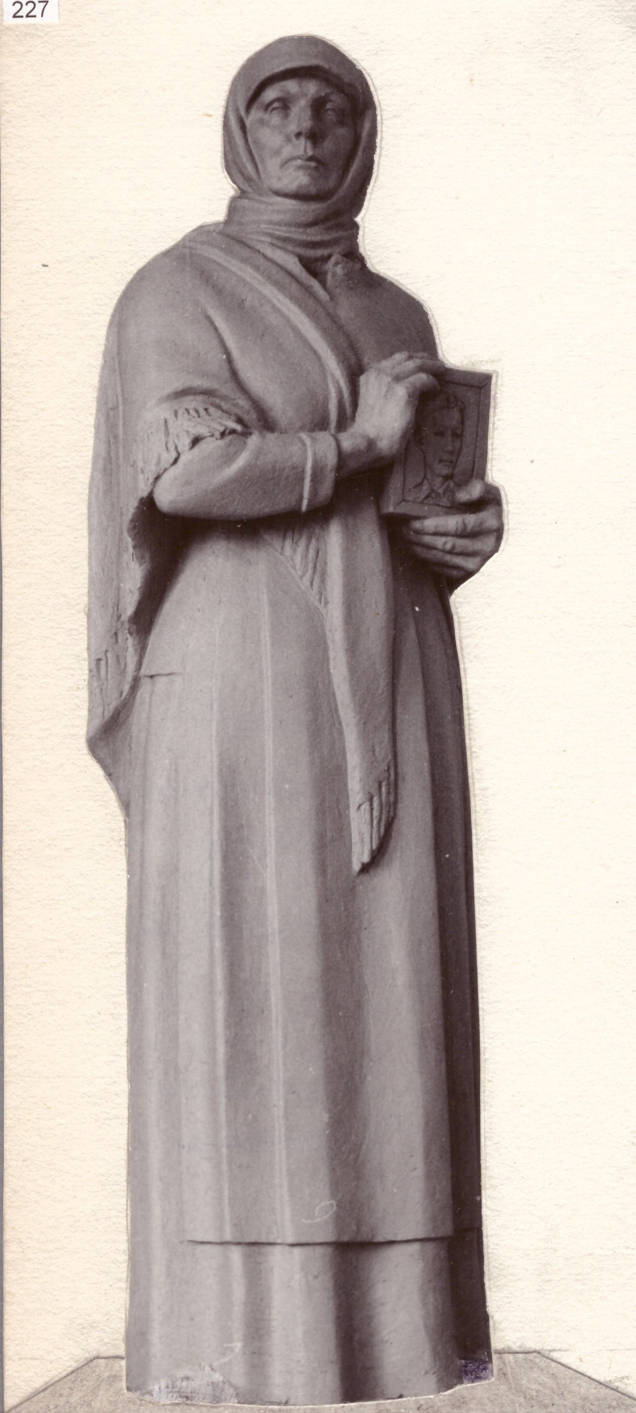 Пам’ятник воїнам-визволителям загиблим в роки Великої Вітчизняної війни. С. Тупальці Новоград-Волинський район Житомирська область. 1987. Скульптор Таранченко В.О., архітектор Черниченко А.П. Мідь кована.